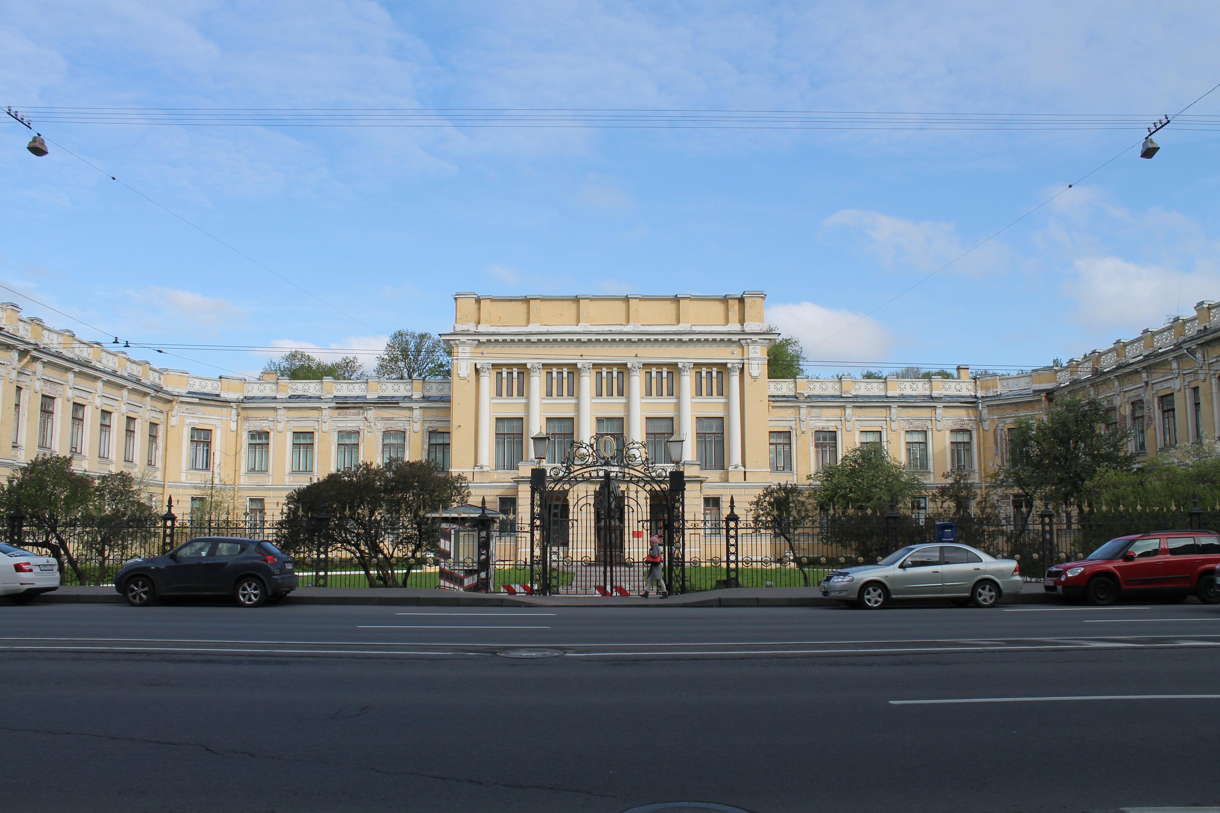 Фасад здания Императорской Николаевской военной академии на Суворовском проспекте, современный вид